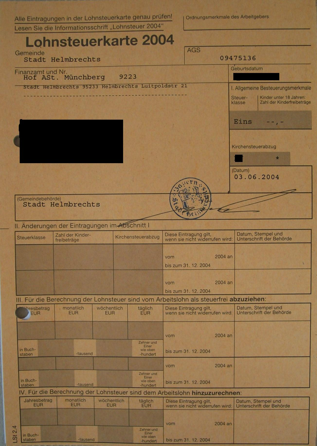 Foto einer Lohnsteuerkarte 2004